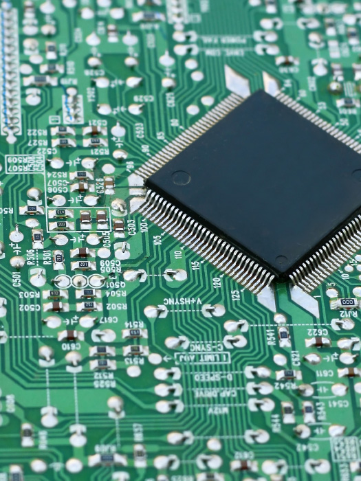 Монгол: Smd